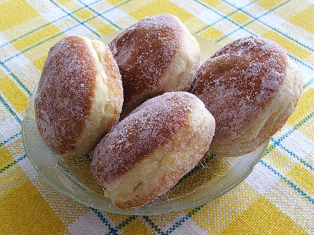 Berliner Pfannkuchen, a popular German pastry